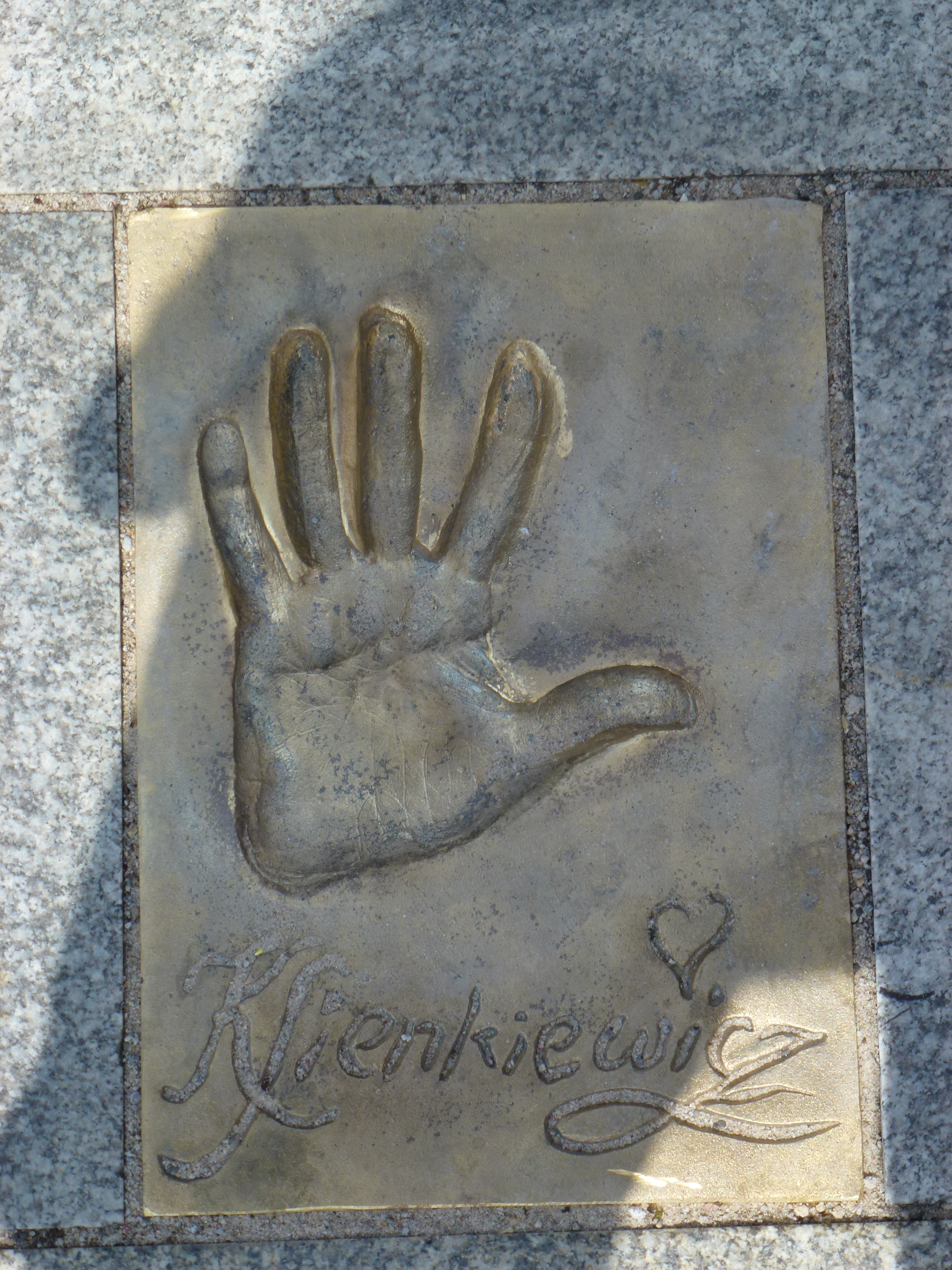 Odcisk gwiazdy na ul. Aleji Gwiazd w Międzyzdrojach woj. zachodniopomorskie pow. kamieński